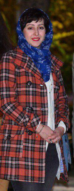 سارا نجفی (موسیقیدان) سومین سال نوای موسیقی ایران - فرهنگسرای نیاوران- ۴ آذر ۱۳۹۶